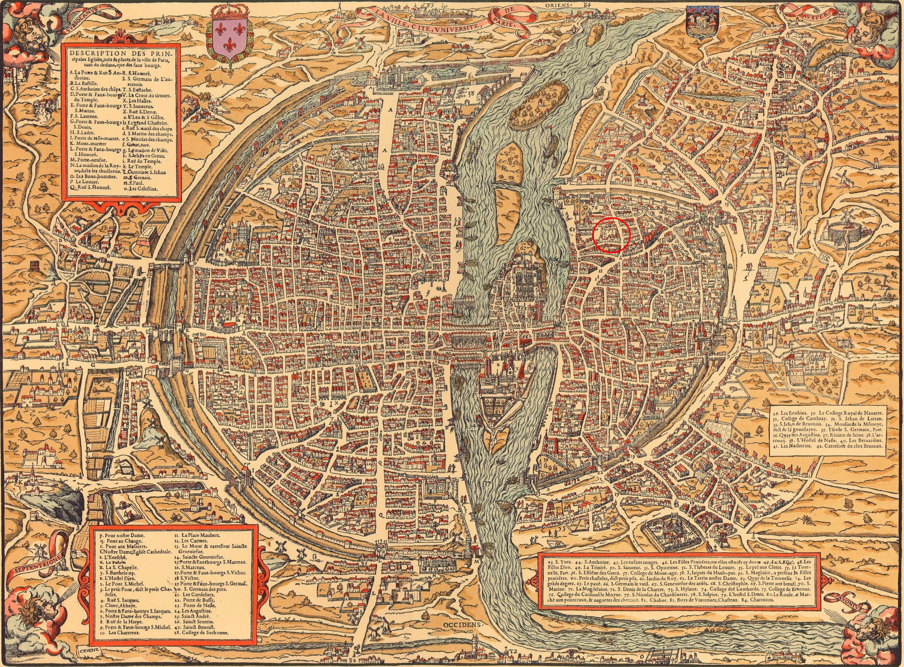 Plan de Paris, la marque en rouge indique le site du Clos du Chardonnet